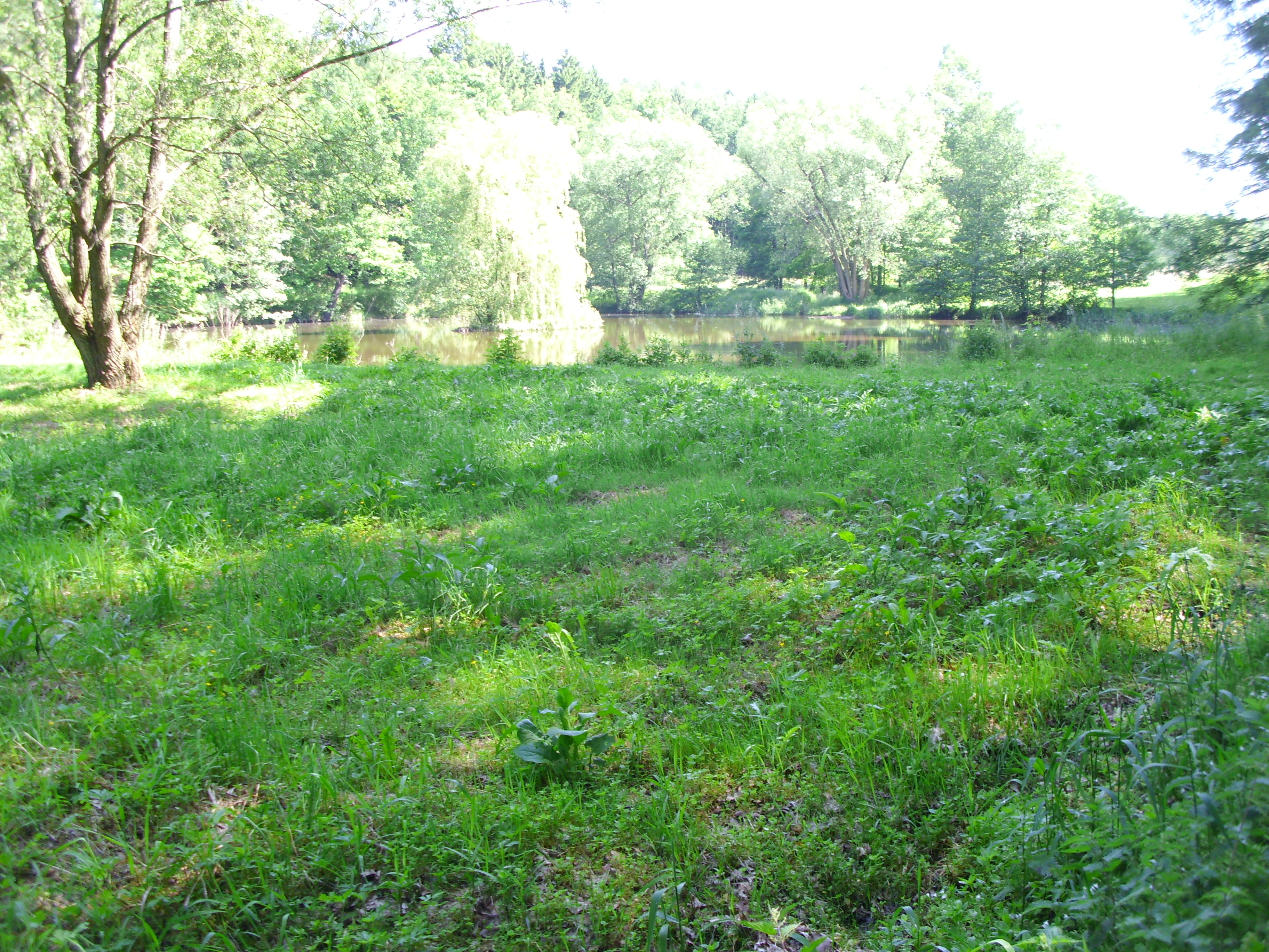 Der Schwarze Teich befindet sich in der Nähe von Oelsa am Rabenauer Forst im Gäßliche Tal.